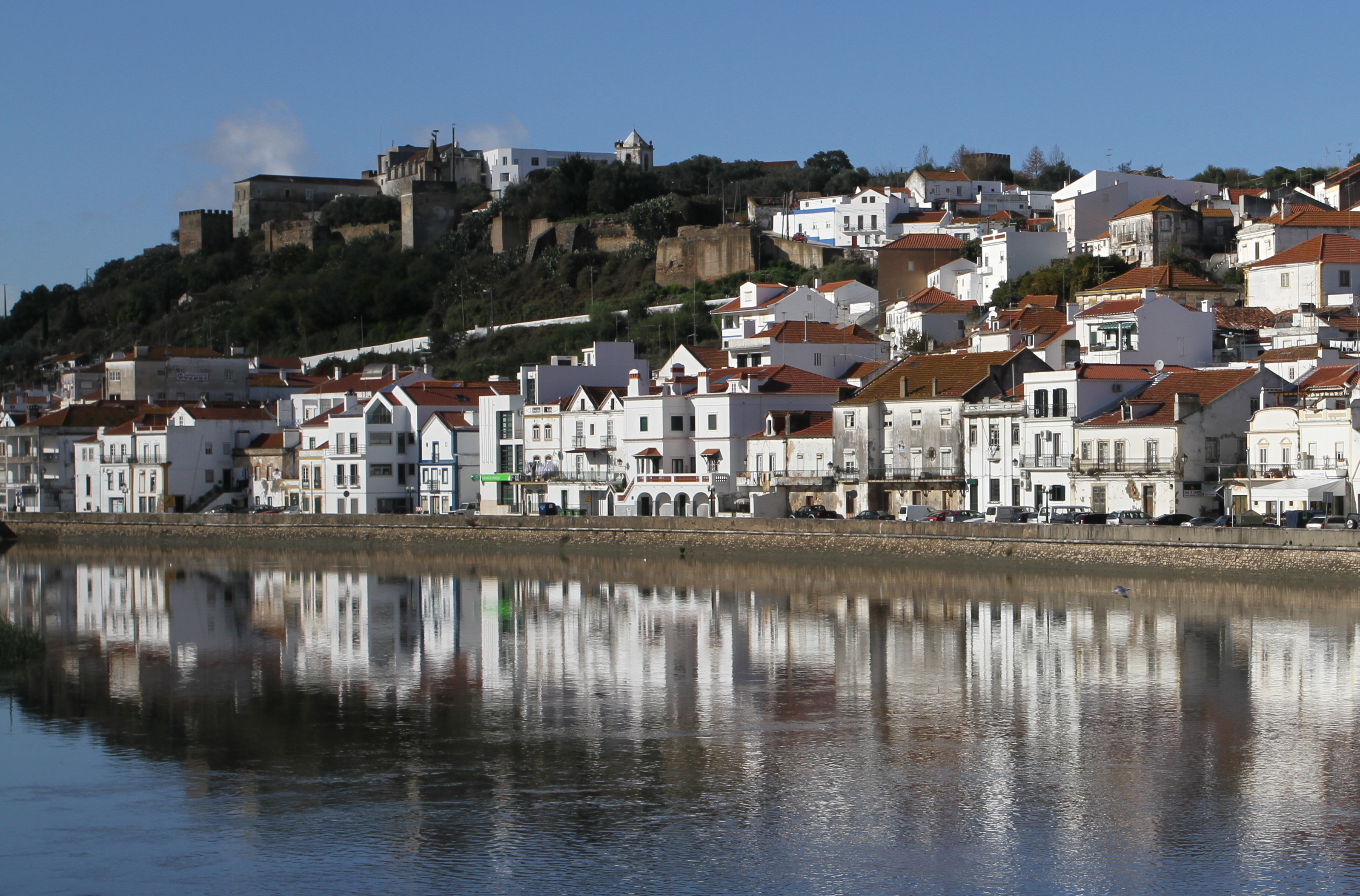 Pousada em Alcacer do Sal This file was uploaded for Wiki Loves Monuments in Portugal with the unique identifier 70159.